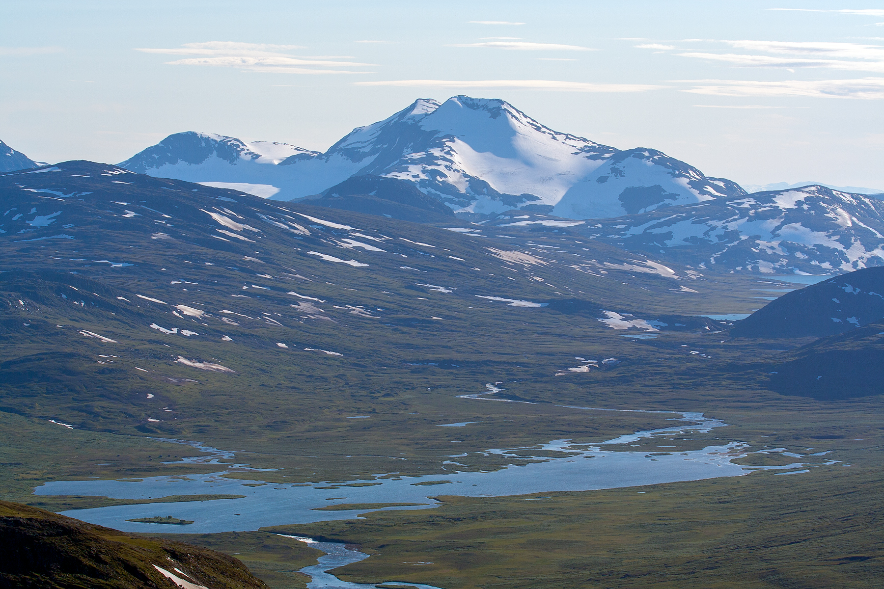 Gáhpesluoppal - vy från 1356 på norra Gierggevárre.